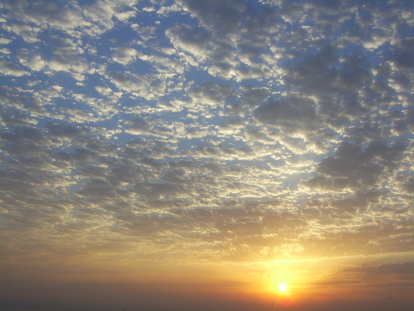 Sunset in Azerbaijan, 2006